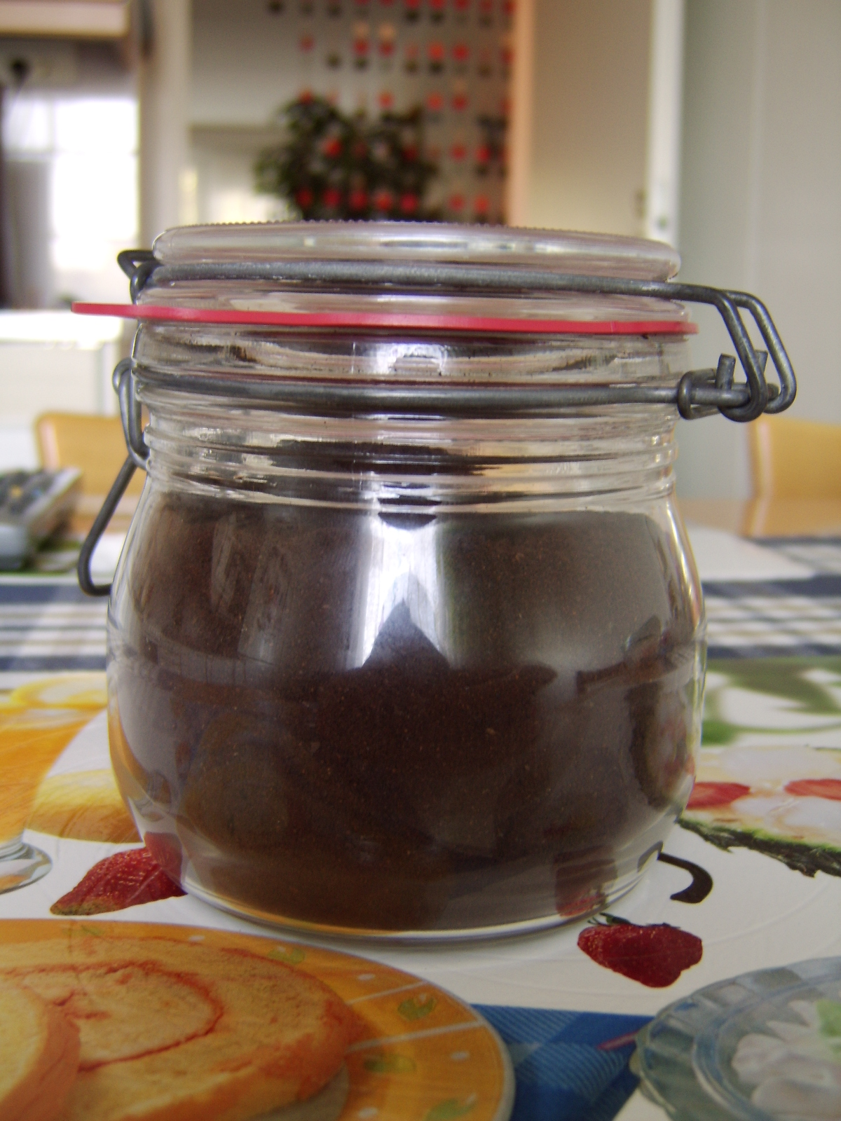 Reusable jam jar, espresso.